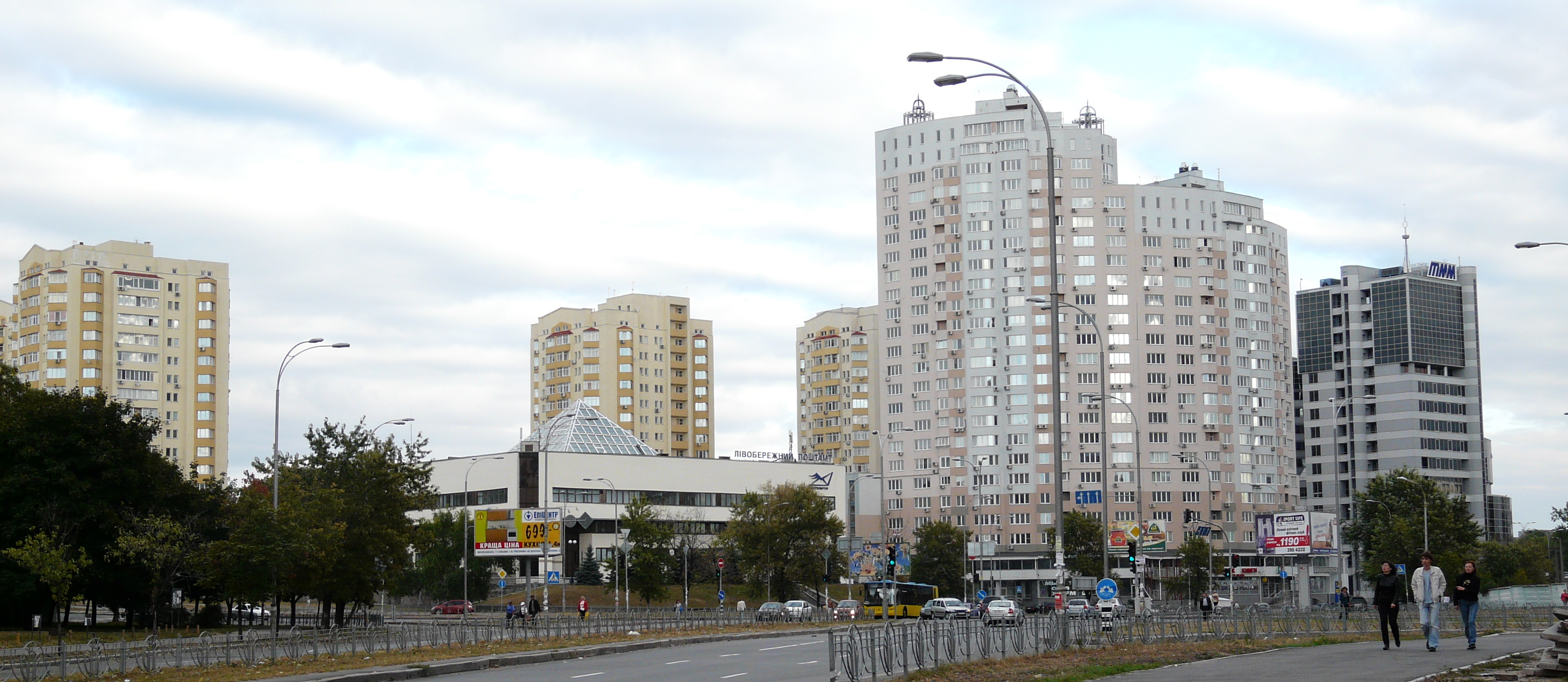 Вулиця Анатолія Луначарського (Київ) 5.JPG: Вулиця Анатолія Луначарського (Київ)